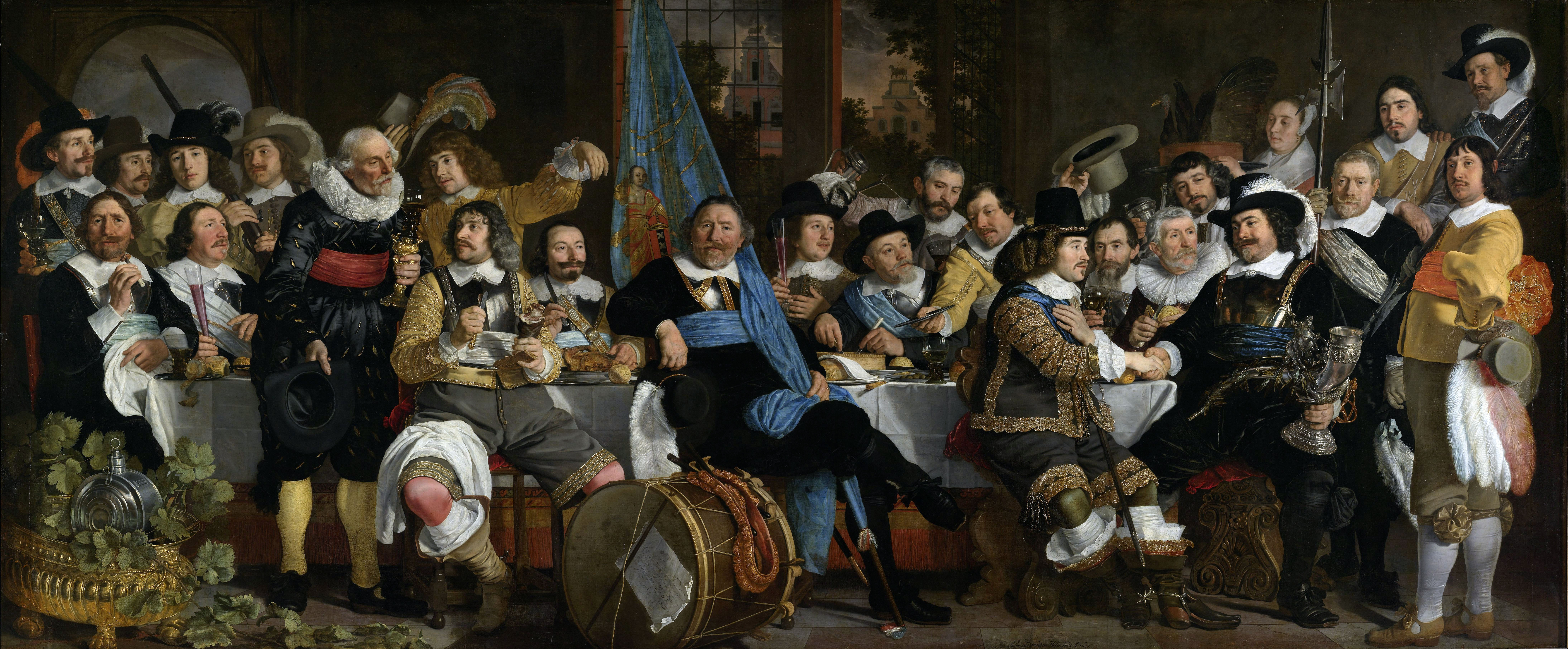 De schuttersmaaltijd in de Voetboogdoelen of St. Jorisdoelen te Amsterdam ter viering van het sluiten van de vrede van Munster, 18 juni 1648. Voorgesteld zijn: kapitein Cornelis Jansz Witsen (met de zilveren drinkhoorn), luitenant Johan Oetgens van Waveren (die zijn hand schudt), de vaandrig Jacob Banningh (zittend naast de grote trommel), Dirck Claesz Thoveling en Thomas Hartog (sergeanten), Pieter van Hoorn, Willem Pietersz van der Voort, Adriaen Dirck Sparwer, Hendrick Calaber, Govert van der Mij, Johannes Calaber, Benedictus Schaeck, Jan Maes, Jacob van Diemen, Jan van Ommeren, Isaac Ooyens, Gerrit Pietersz van Anstenraadt, Herman Teunisz de Kluyter, Andries van Anstenraadt, Christoffel Poock, Hendrick Dommer Wz, Paulus Hennekijn, Lambregt van den Bos en Willem (de trommelslager). Op de grote trommel hangt een papier met een gedicht van Jan Vos. Door de openstaande ramen is de gevel van de brouwerij 'het Lam' aan de Singel zichtbaar. Rechts brengt een vrouwen een kalkoenpastei binnen. Op tafel staan tinnen borden, roemers en andere glazen. Links staat op de vloer een grote metalen koeler met een wijnvat; Bartholomeus van der Helst (1613–1670), olieverf op doek, 1648 Naambord